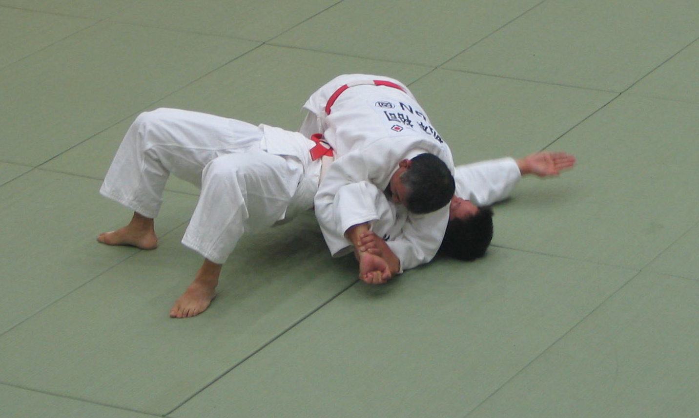 udegarami in katamenokata